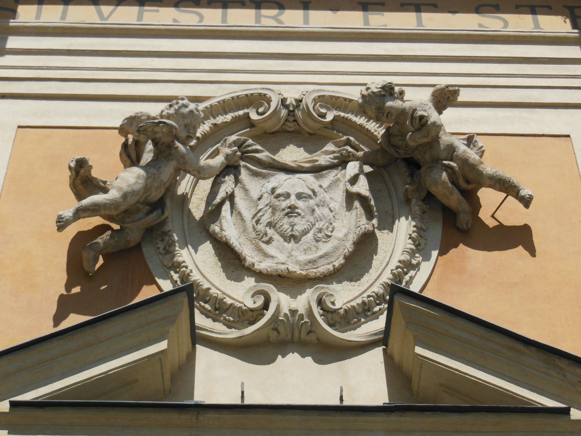 Chiesa di San Silvestro in Capite a Roma (piazza San Silvestro), facciata esterna, particolare con il rilievo dell'Immagine edessena